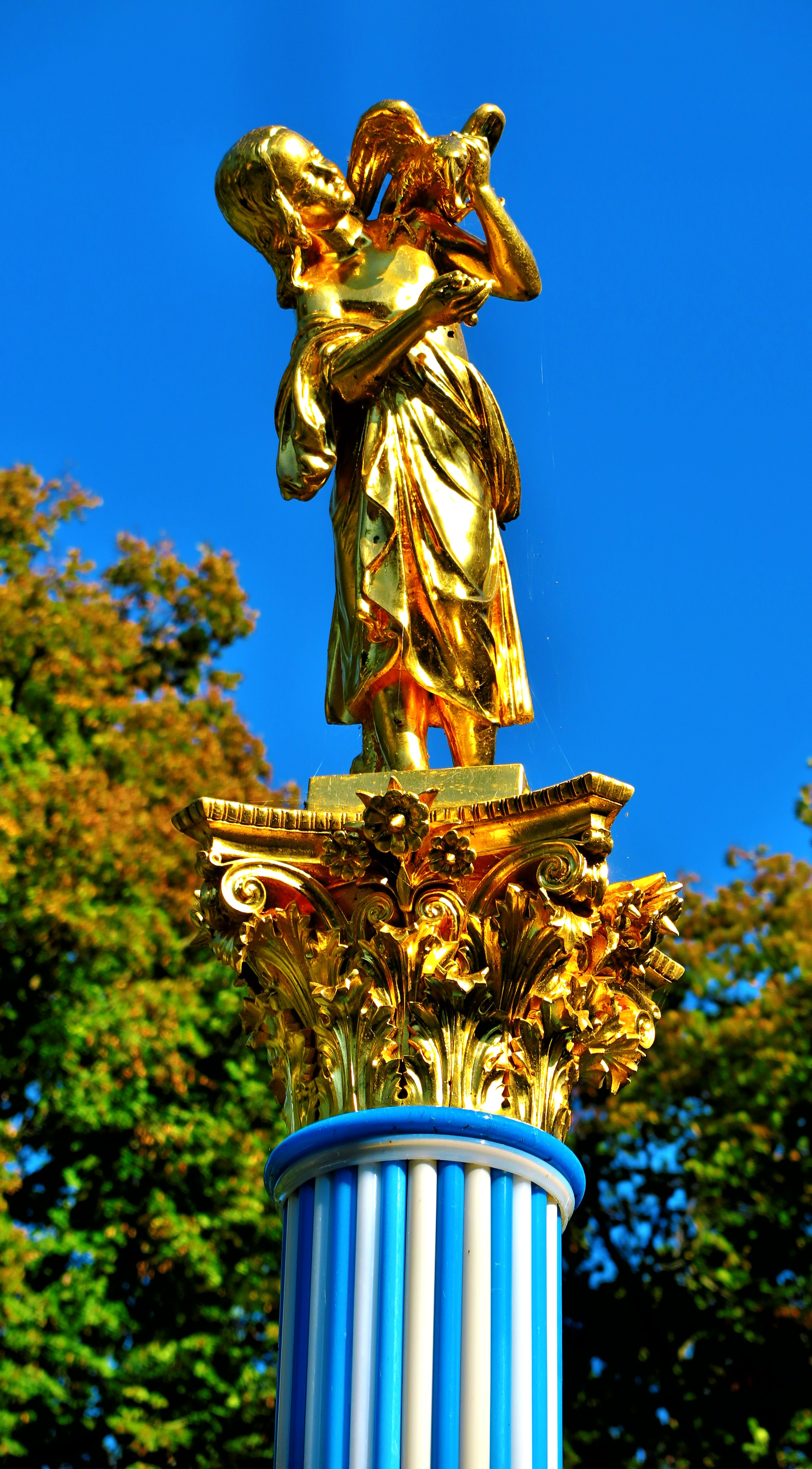 Die Gläserne Säule im Zentrum des Rosariums